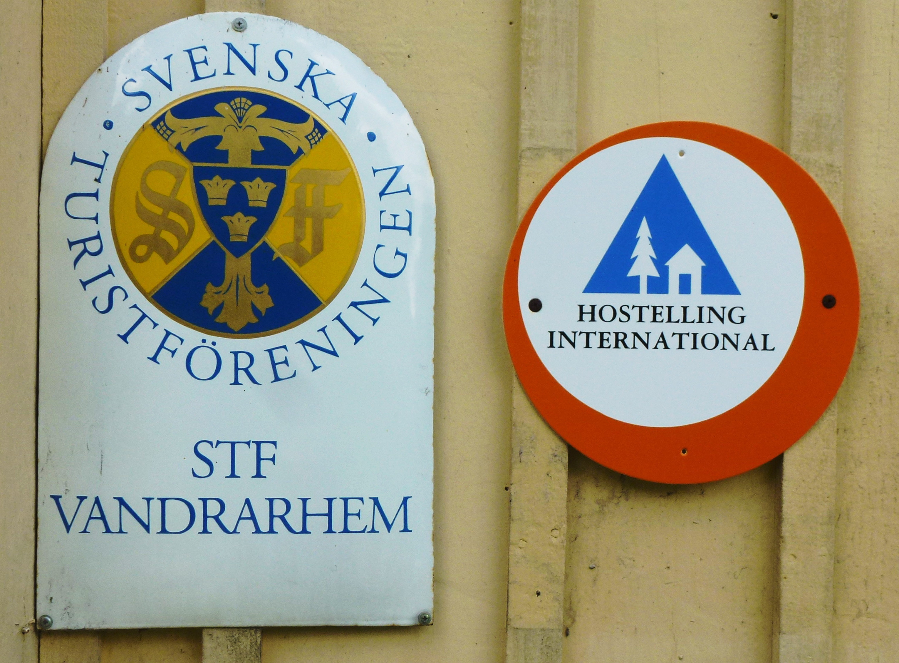 Lilla Tyresö / Prinsvillan